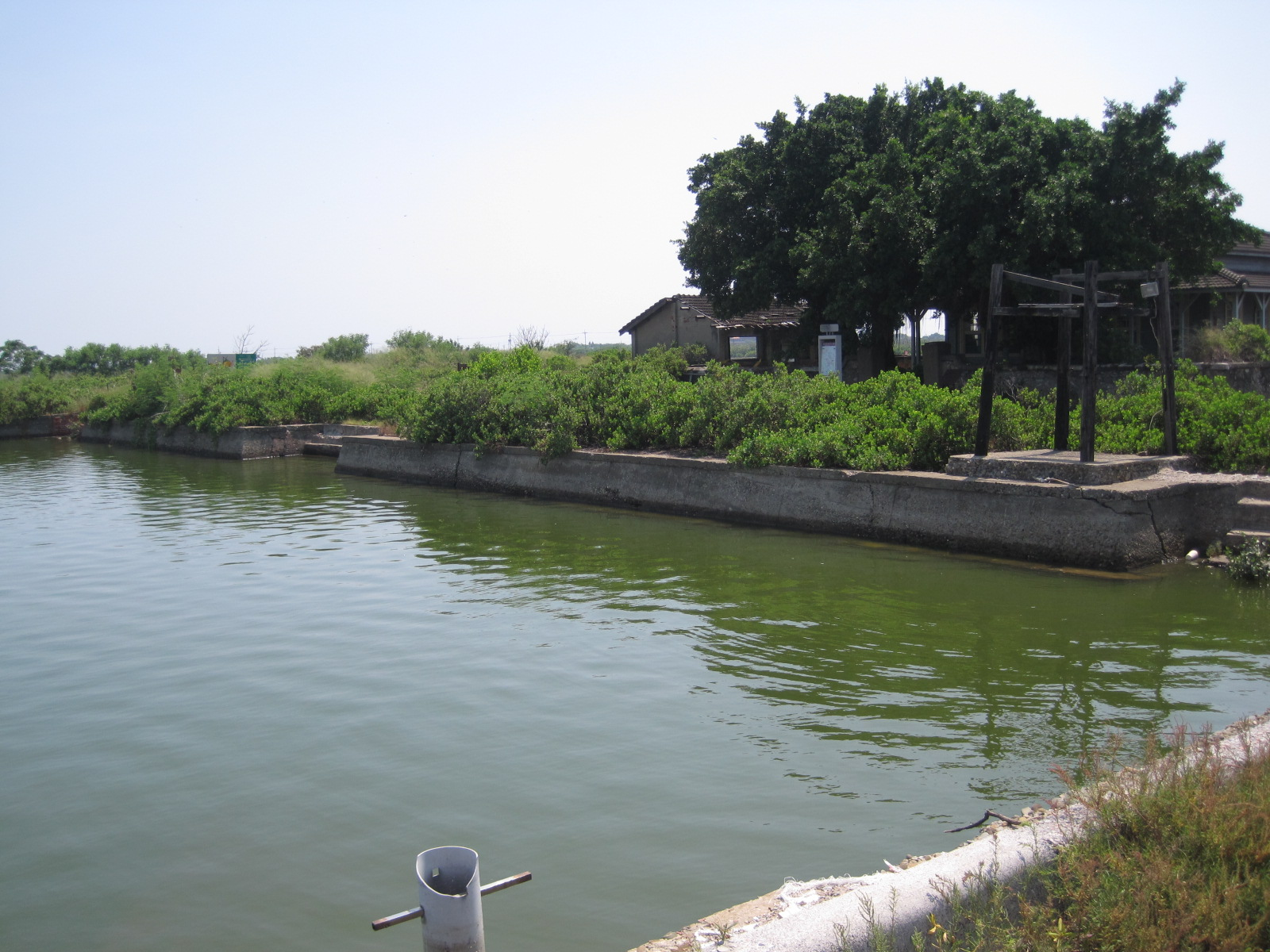 中文（台灣）: 臺南市安南區安順鹽田運鹽碼頭